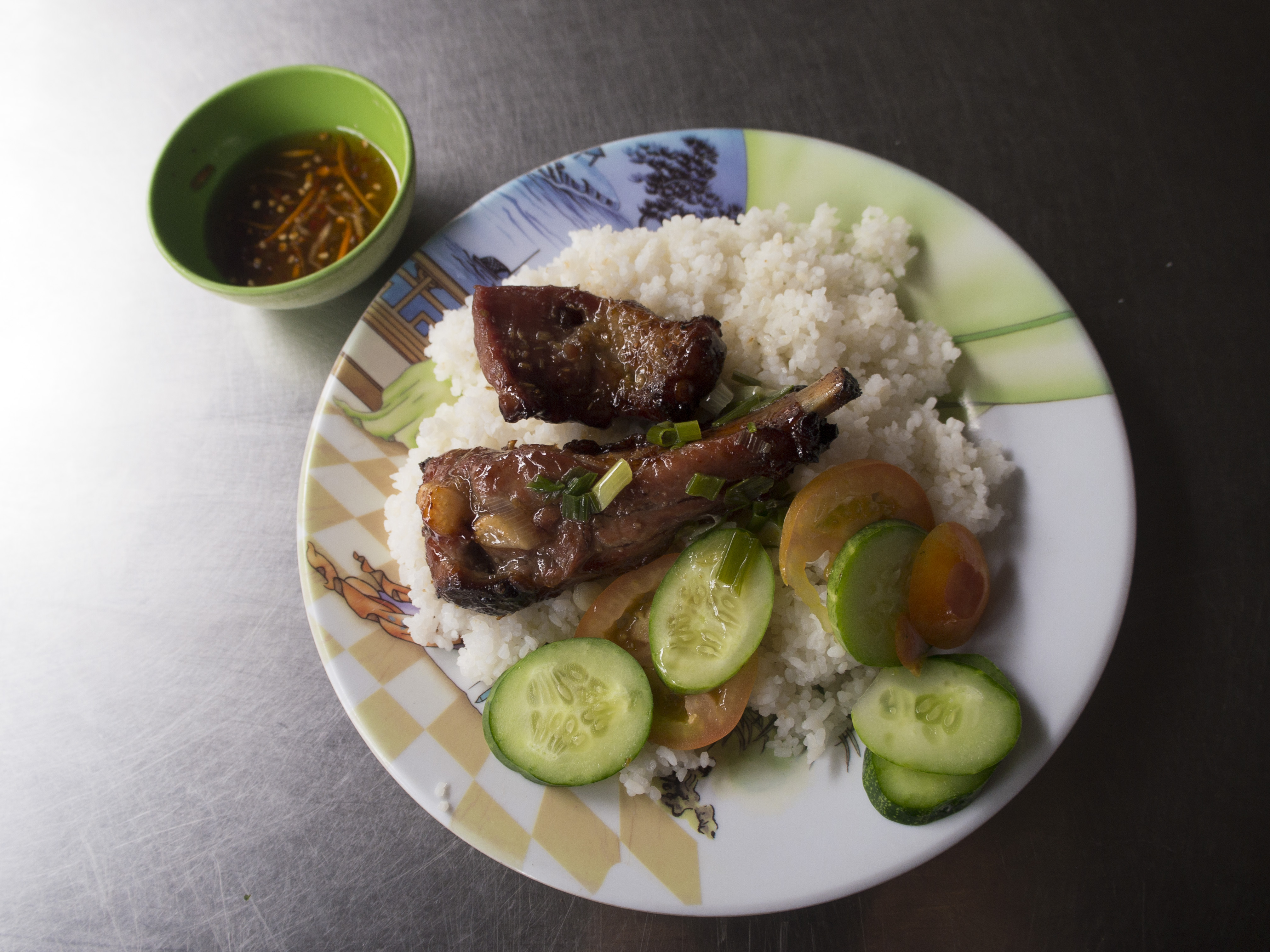 Đóng góp wiki, không lấy bản quyền